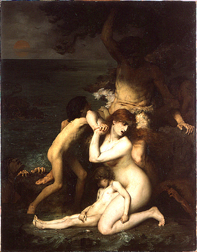 Gabriel Ferrier, Une scène du Déluge, 1872, Paris, École Nationale Supérieure des Beaux-Arts